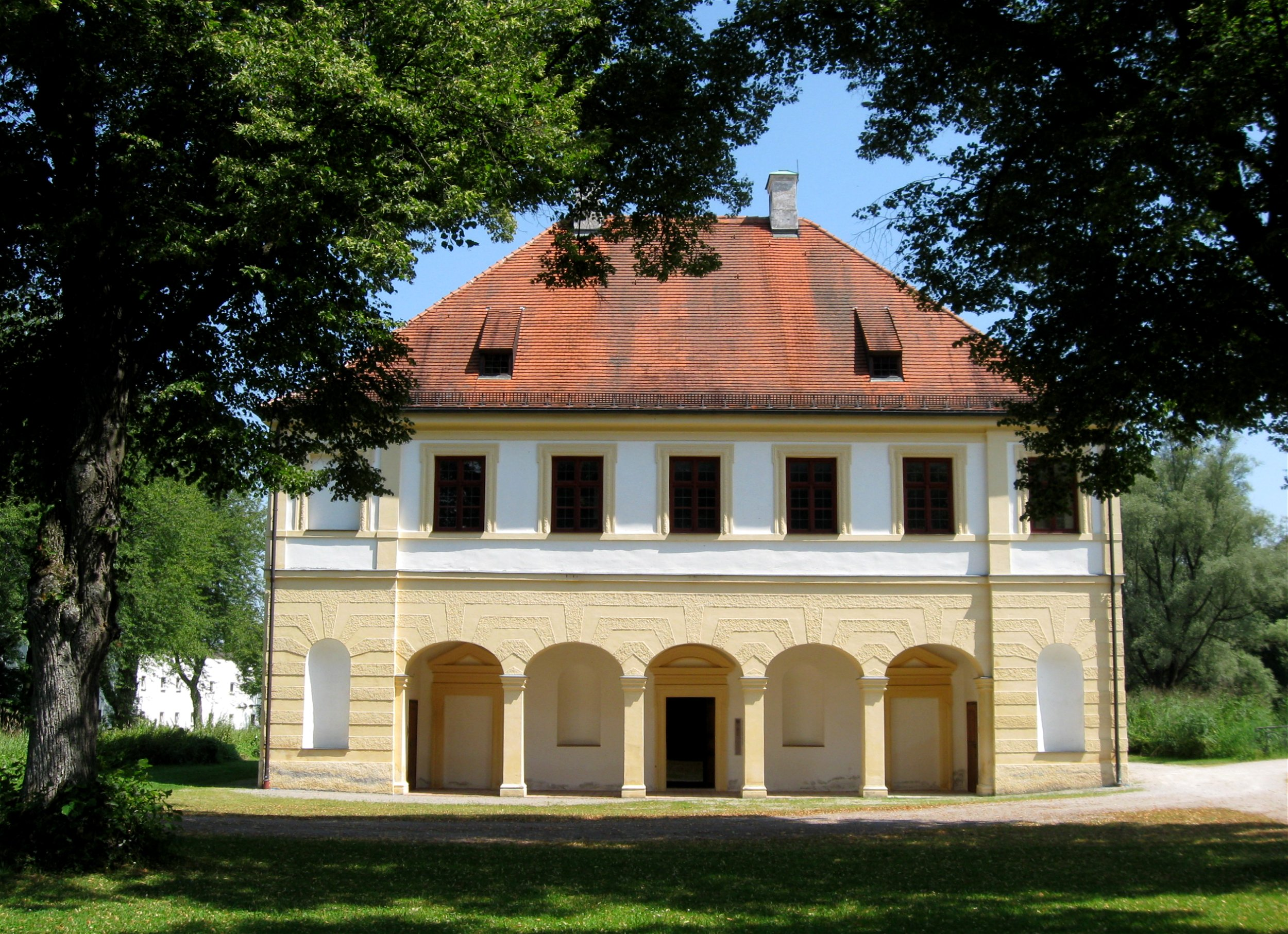 Schloss Lustheim, Nördlicher Pavillon